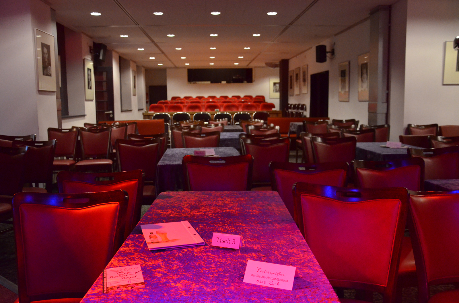 Impressionen vom und im Theater am Küchengarten (TAK) in Hannover, der Kabarettbühne im denkmalgeschützten Sockelgeschoss der 1927 unter Karl Elkart erbauten Städtischen Bäder in Hannover-Linden. Aus Zeitgründen wurde hier zunächst auf eine Einzelbeschreibung der Fotografien verzichtet; Details können Sie jedoch auch ohne Ihre eigene Arbeit schon jetzt aus dem jeweiligen Dateinamen entnehmen ...